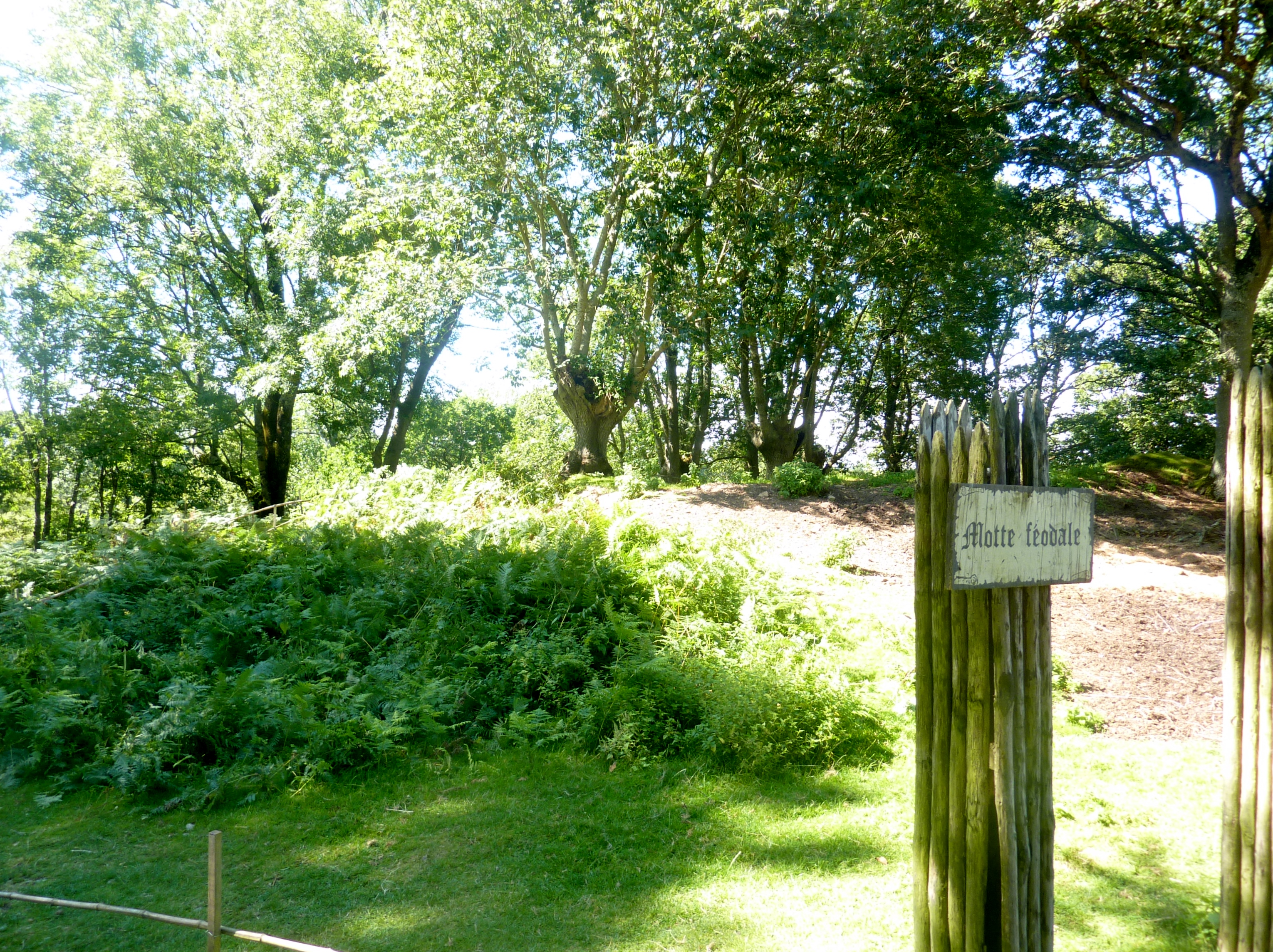 La motte féodale située dans le parc animalier du Quinquis .